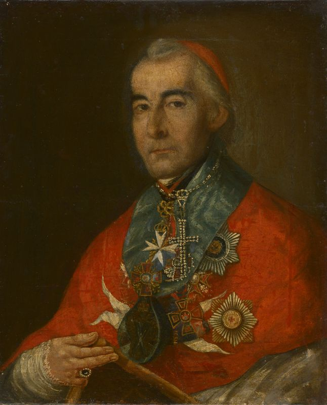 Беларуская (тарашкевіца): Партрэт Станіслава Богуша Сестранцэвіча (Stanisłaŭ Bohuš Siestrancevič)